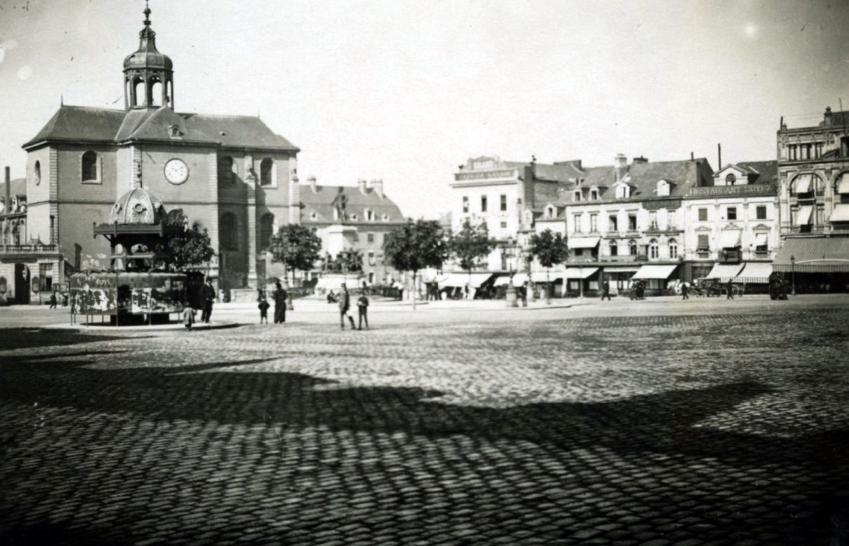 Une photo de la place de la république aux alentours de 1900. La cliché appartient à la ville du Mans et l'auteur est inconnu.